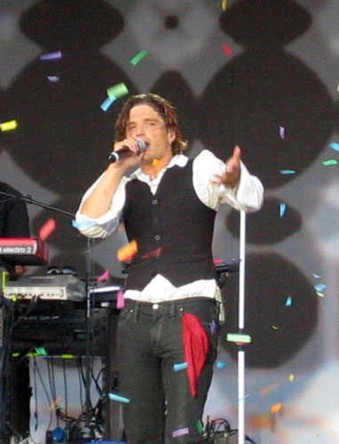 Andreas Johnson i Örebro under Rocktåget 2006